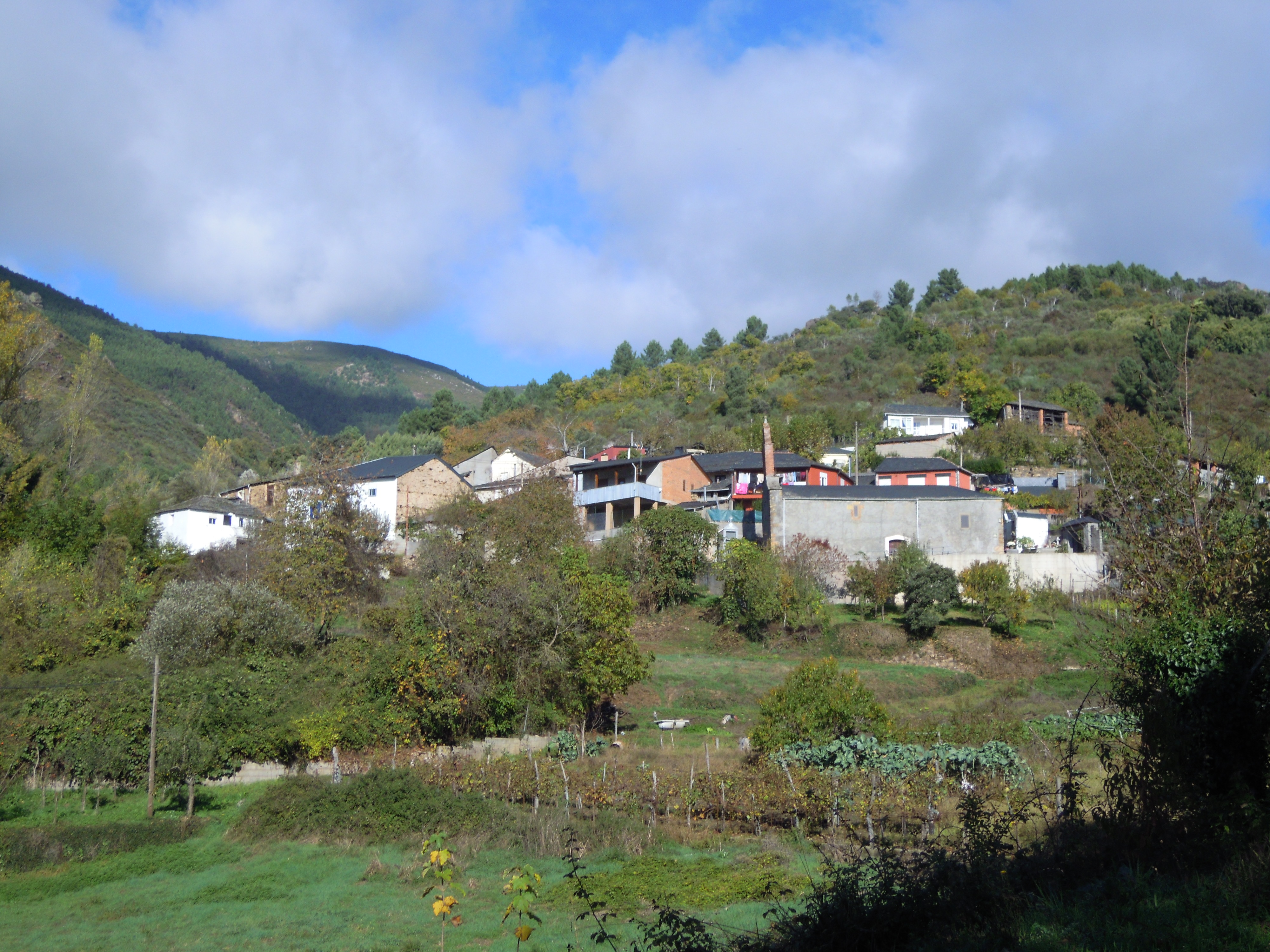 Vista da aldea de Forcadela, coa igrexa parroquial de Forcadela e Nogaledo (O Barco de Valdeorras)